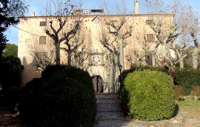 Castellnou de Llinars a la comarca del Vallès Oriental - Catalunya